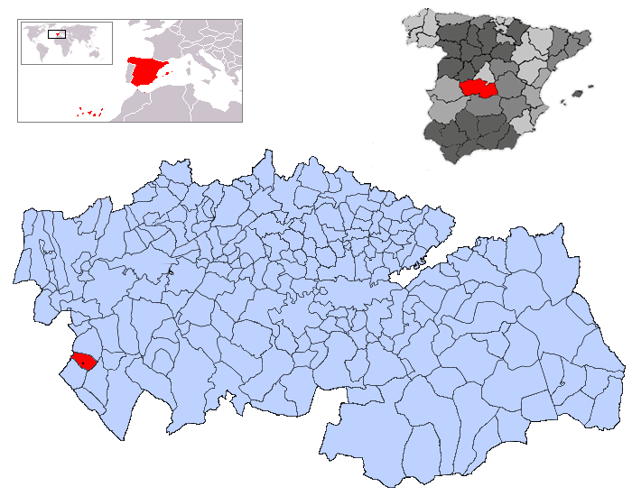 Aldeanueva en la provincia de Toledo